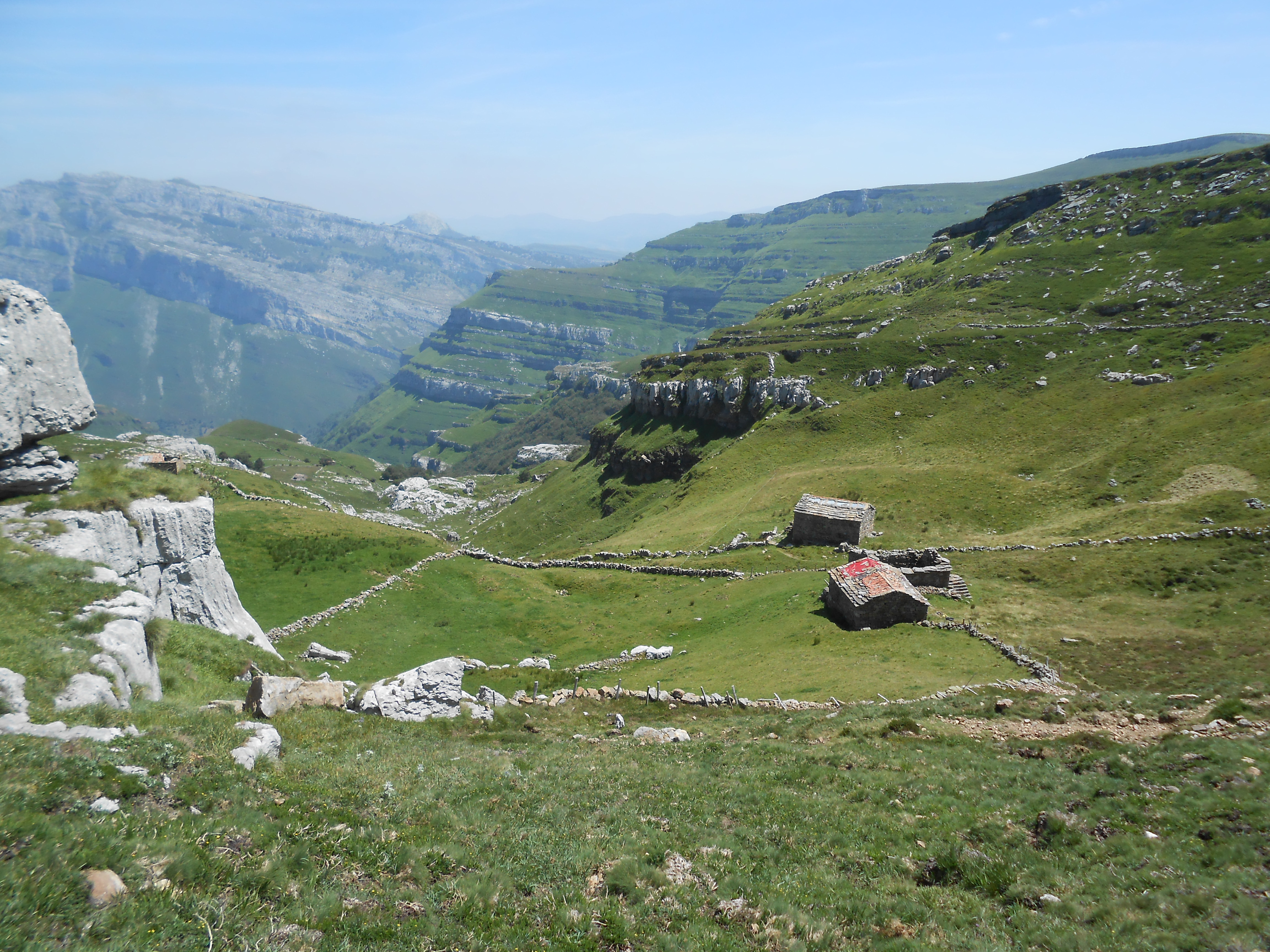 Cabañas de Sotombo con el macizo de Mortillano al fondo. Zona del Asón, Montaña Oriental de Cantabria. This is a photography of a Special Area of Conservation in Spain with the ID: ES1300002. Natura2000 entry, EEA entry